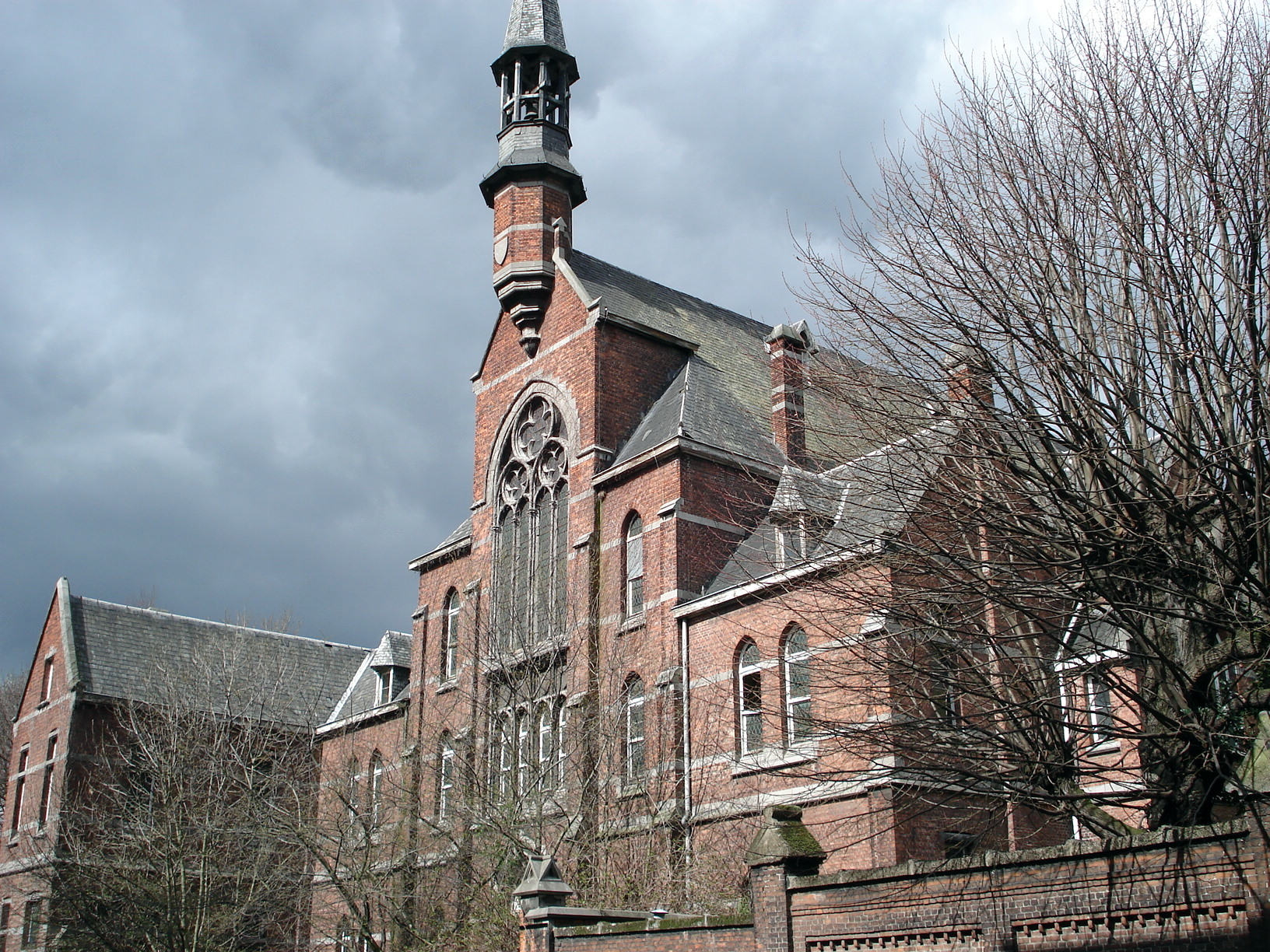 Franciscanessenklooster, Lange Kongostraat, te Antwerpen. Arch. Jules Bilmeyer.